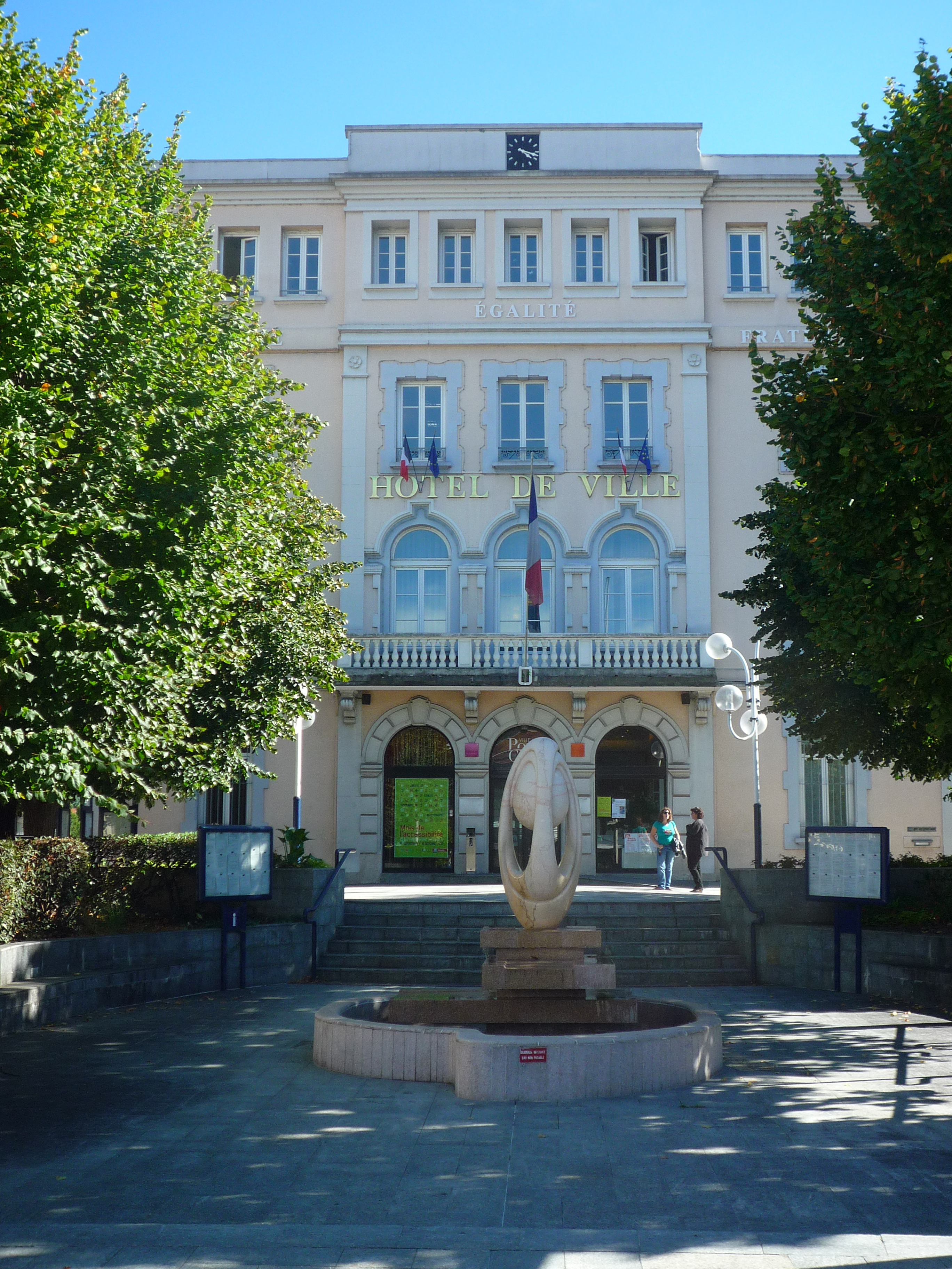 Hôtel de ville de Pont-de-Claix, (Isère).